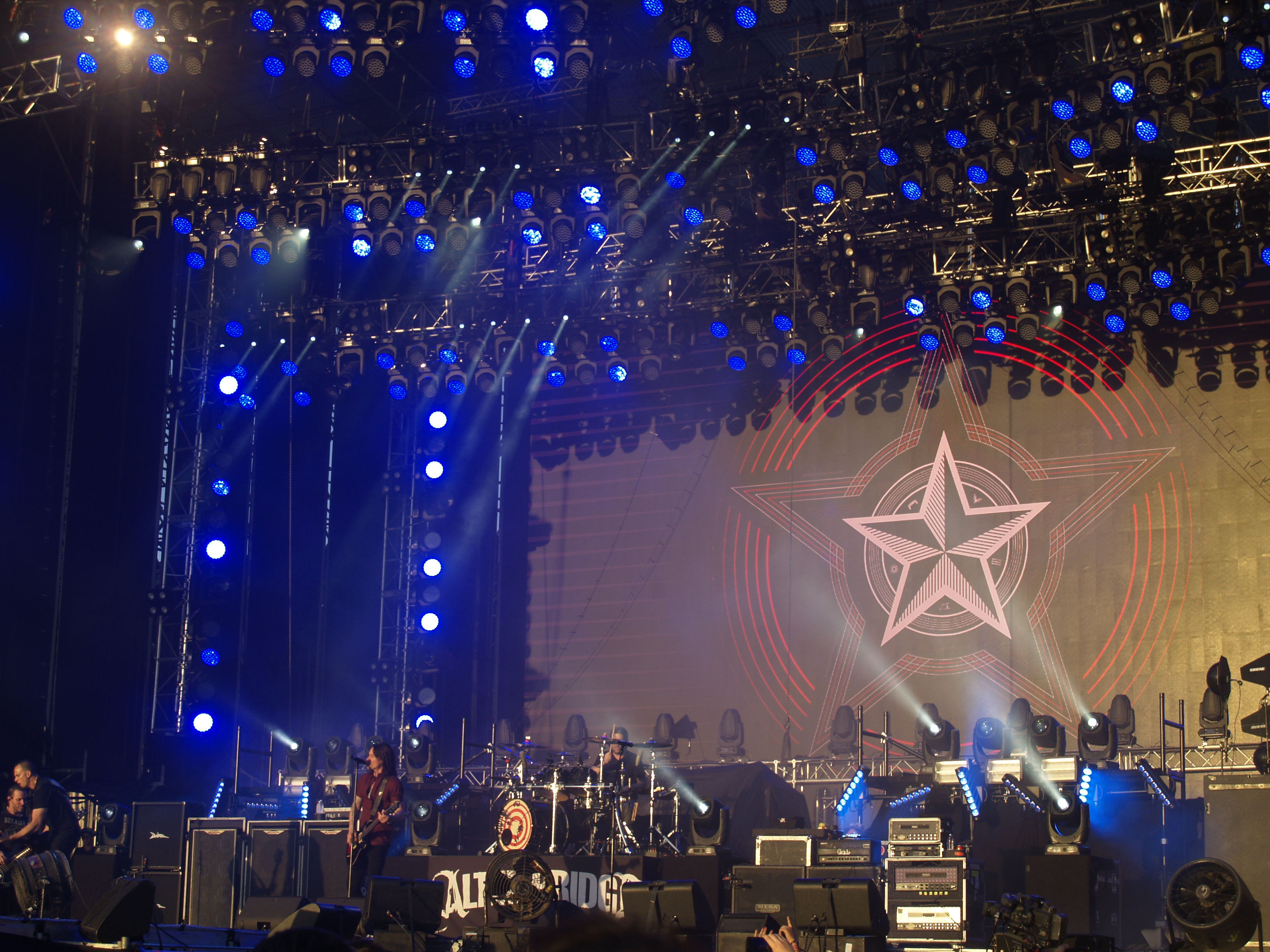 Barcelona Rock Festival 2017 - Alter Bridge